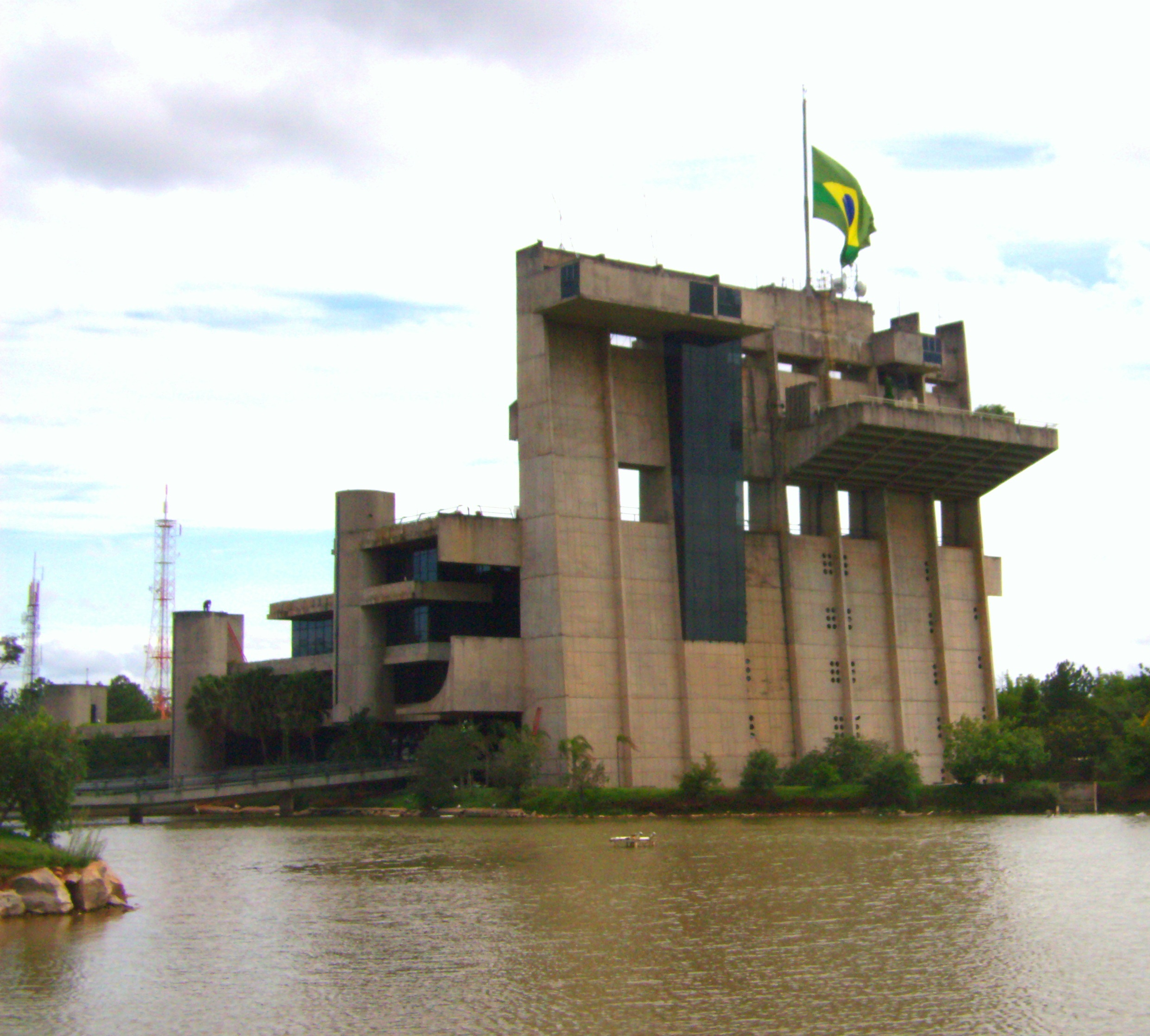 Paço Municipal de Sorocaba SP.